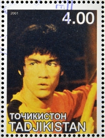 Bruce Lee